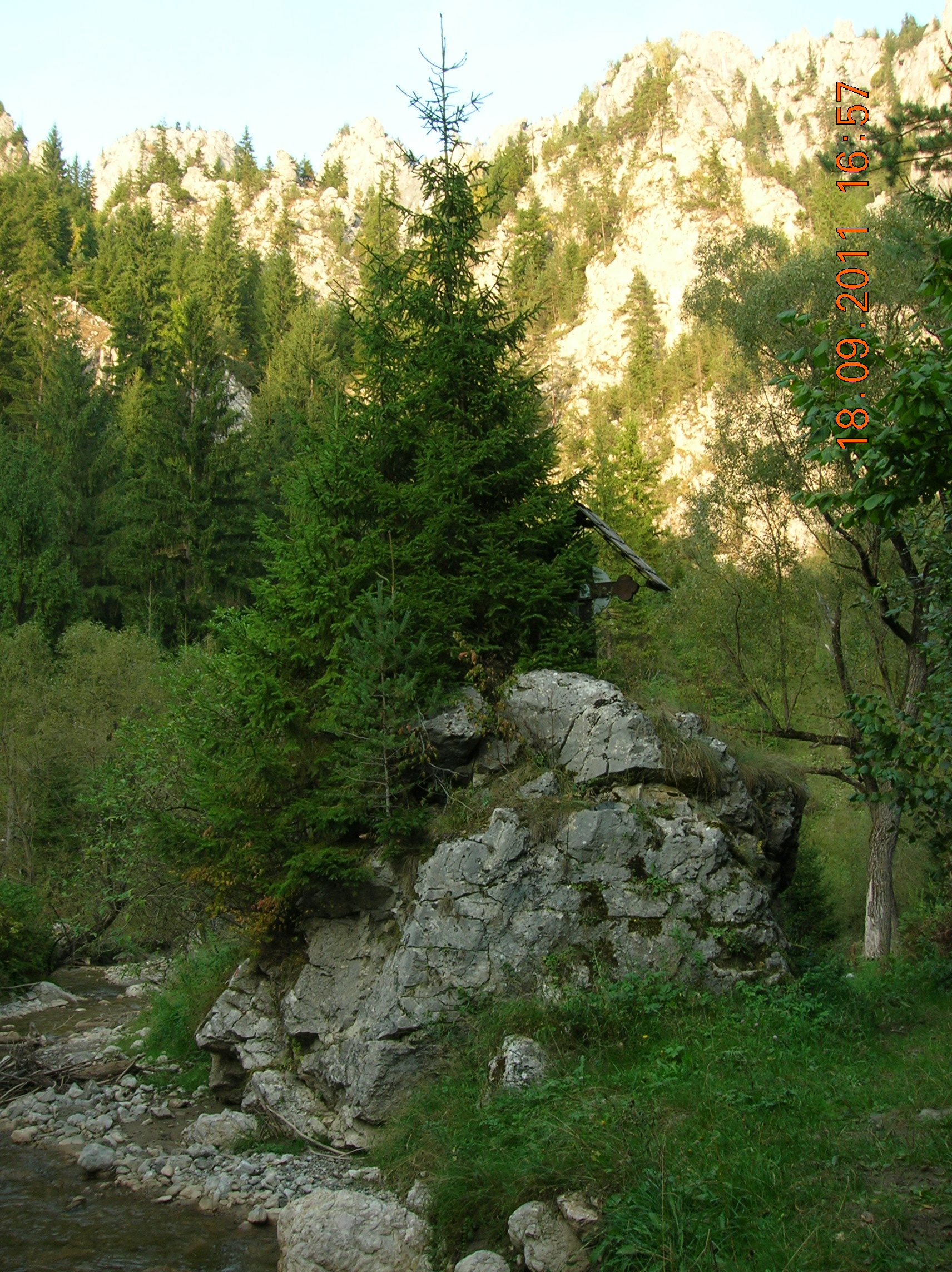 Cheile Şugăului, Rezervaţia Cheile Şugăului-Munticelu, Parcul Naţional Cheile Bicazului-Hăşmaş, Judeţul Neamţ, România